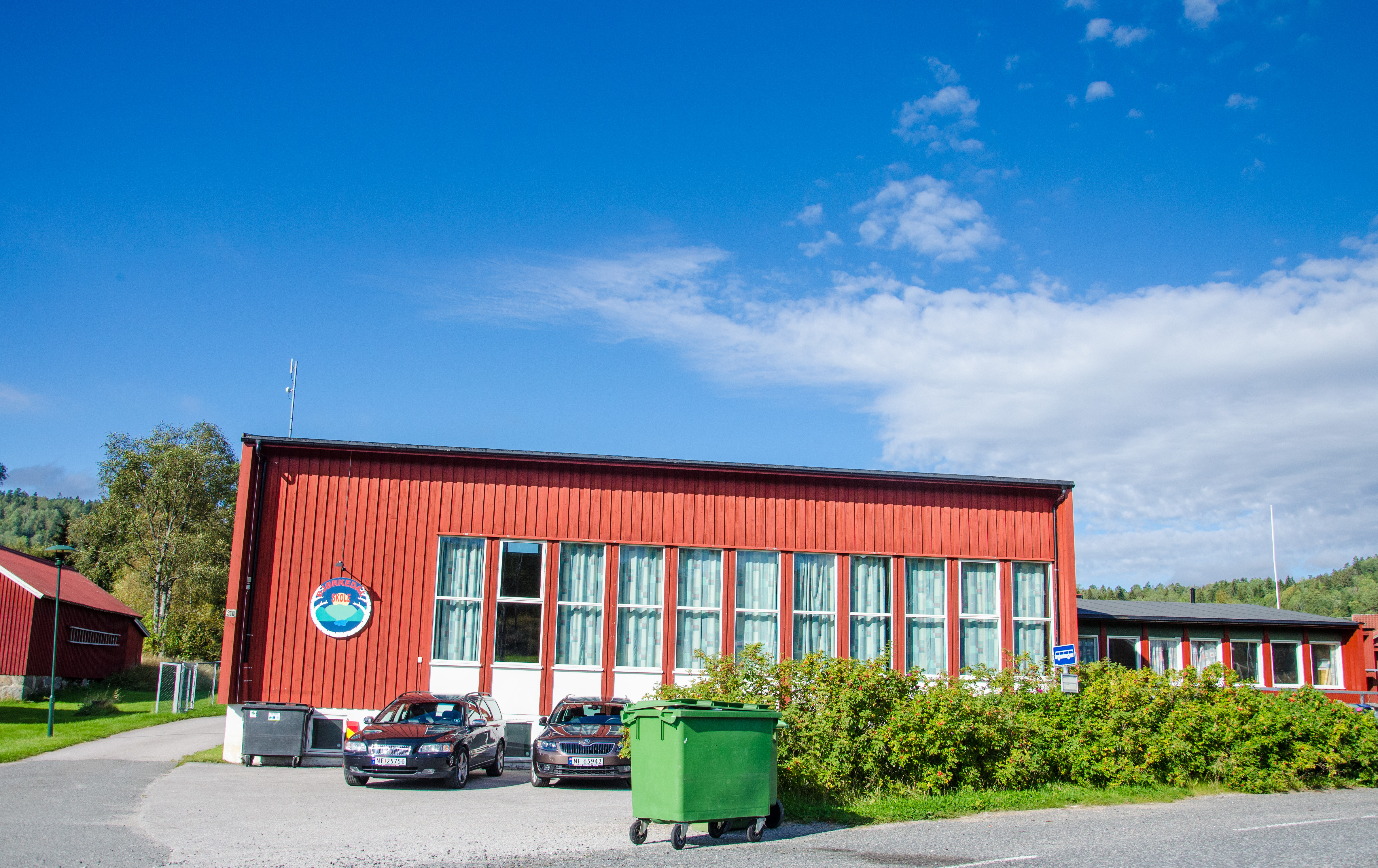 Bjørkedal skole, Porsgrunn, Telemark